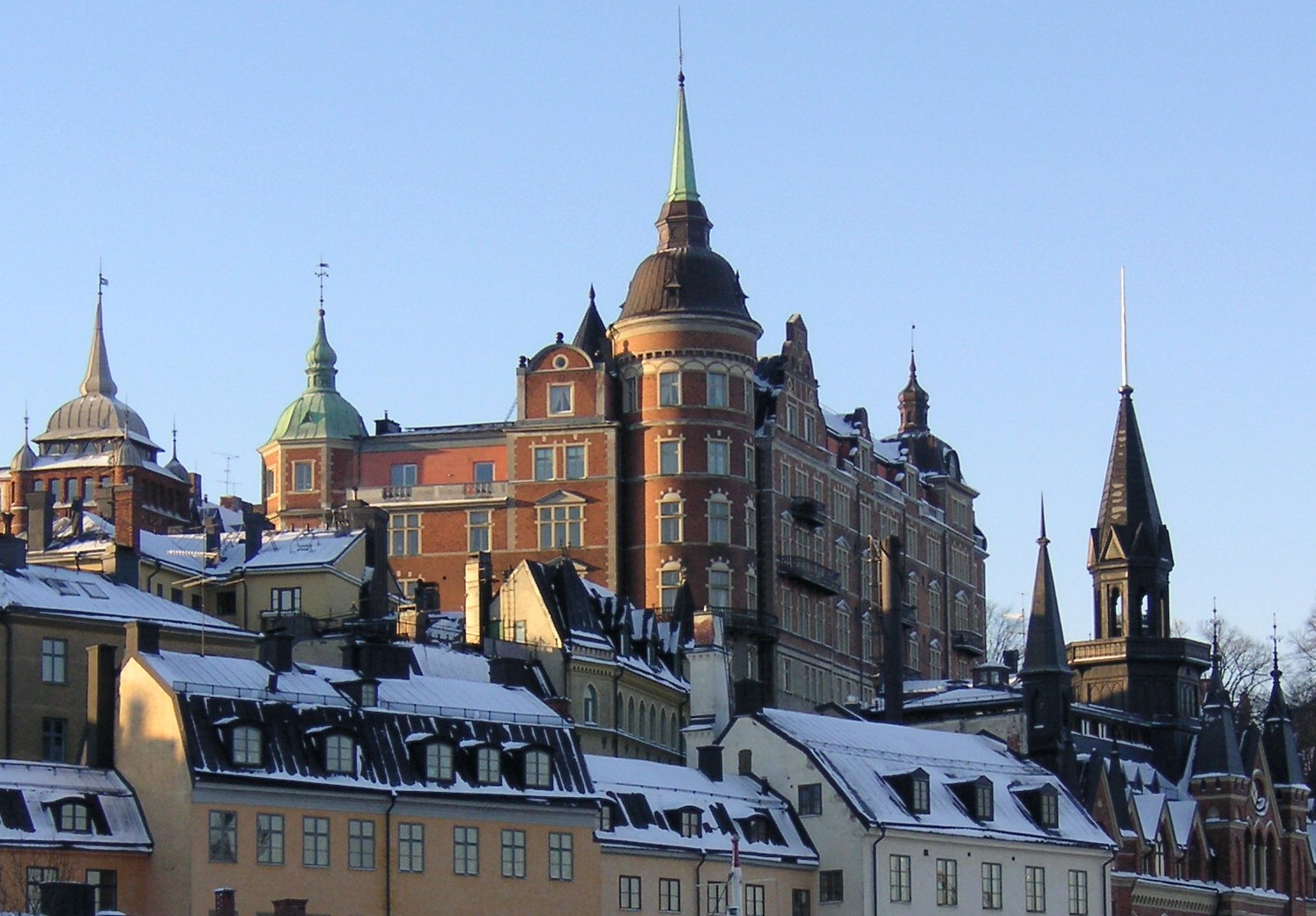 Laurinska huset på Södermalm i Stockholm, det spetsiga tornet t.h. tillhör Mariahissen.